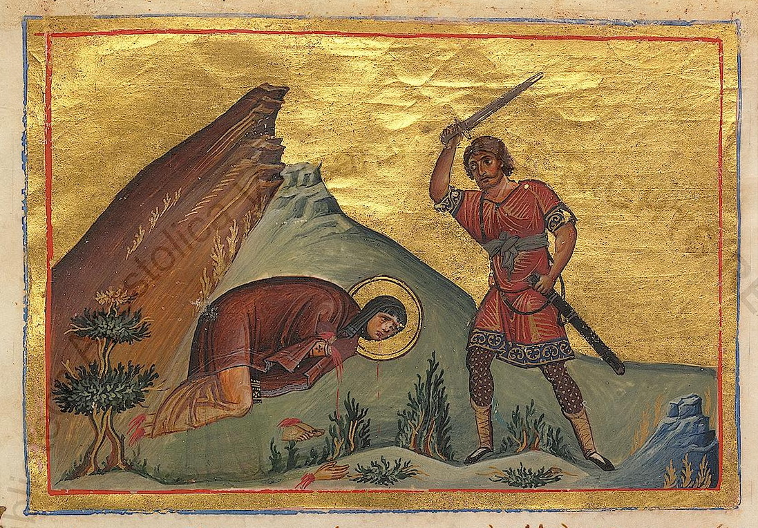 Константинополь. 985 г. Миниатюра Минология Василия II. Ватиканская библиотека. Рим.